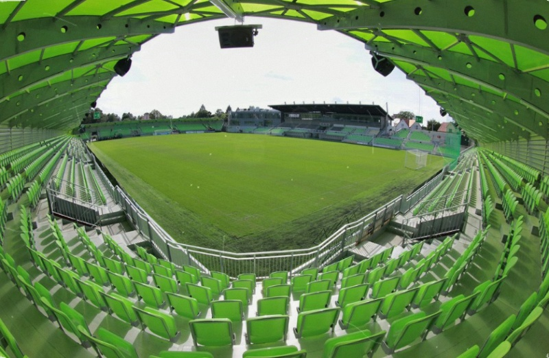 New football arena Karvina